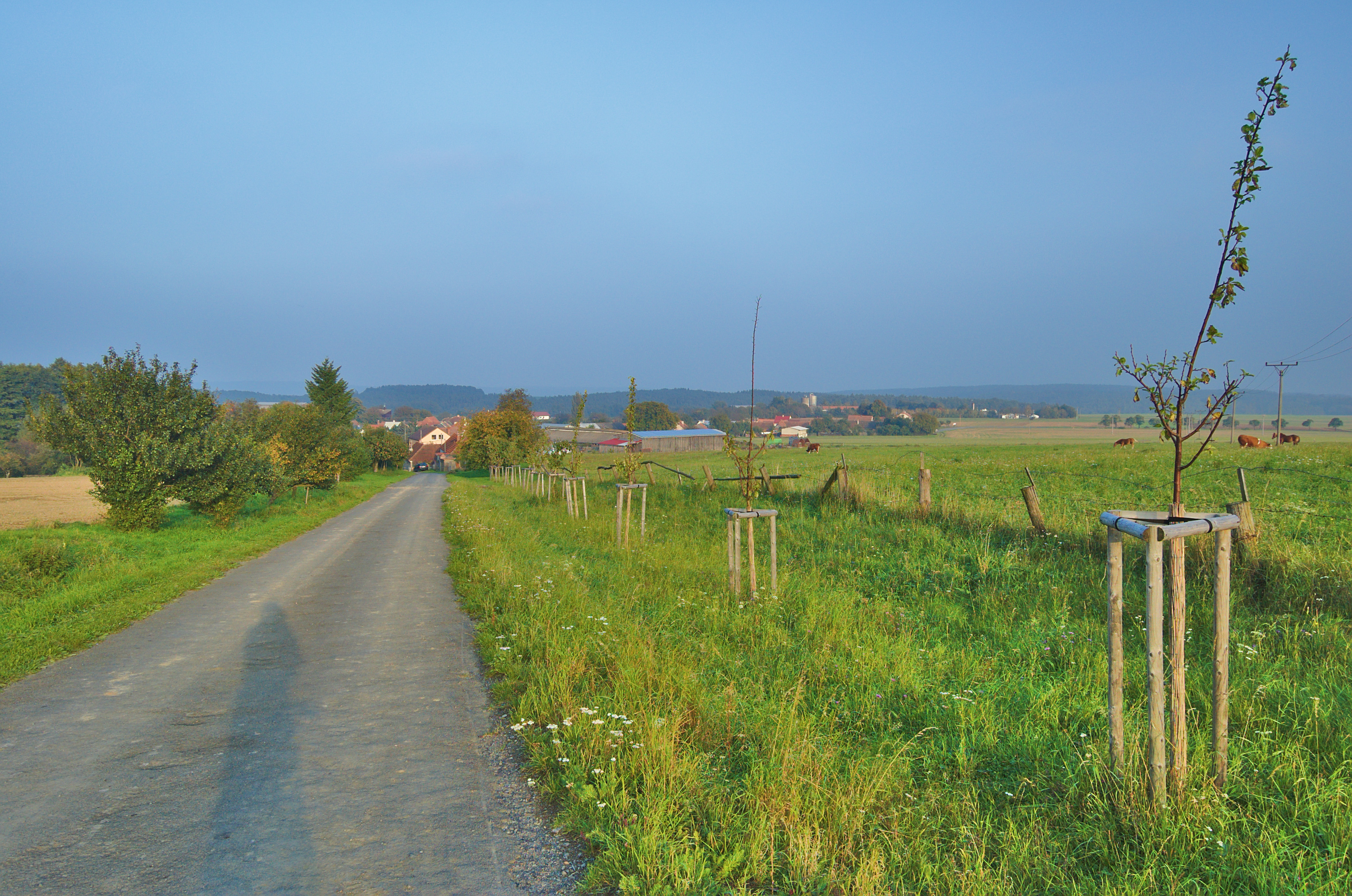 Pohled na vesnici od západu, Ochoz, okres Prostějov